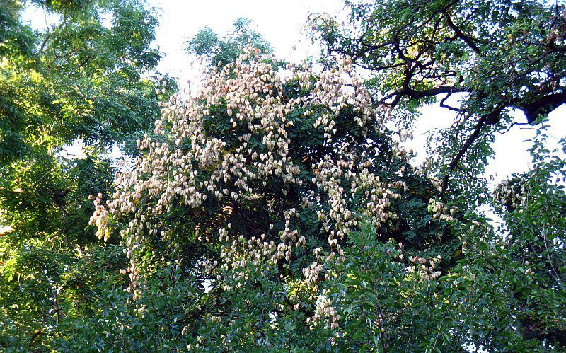 Fruchtender Blasenbaum (Koelreuteria paniculata) im Wiener Stadtpark